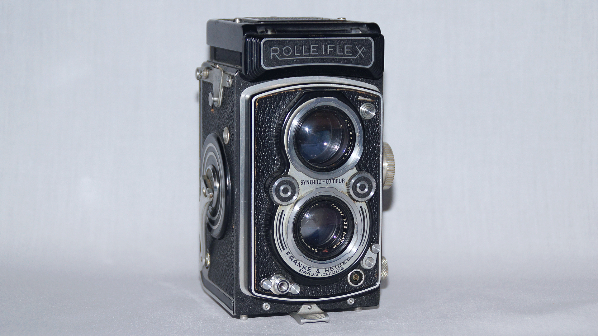 Rolleiflex Automat MX2 mit Zeiss Tessar (Opton-Objektiv aus Oberkochen) 75mm, 1:3,5, von Franke & Heidecke Braunschweig - Foto 2019 Wolfgang Pehlemann DSC04837